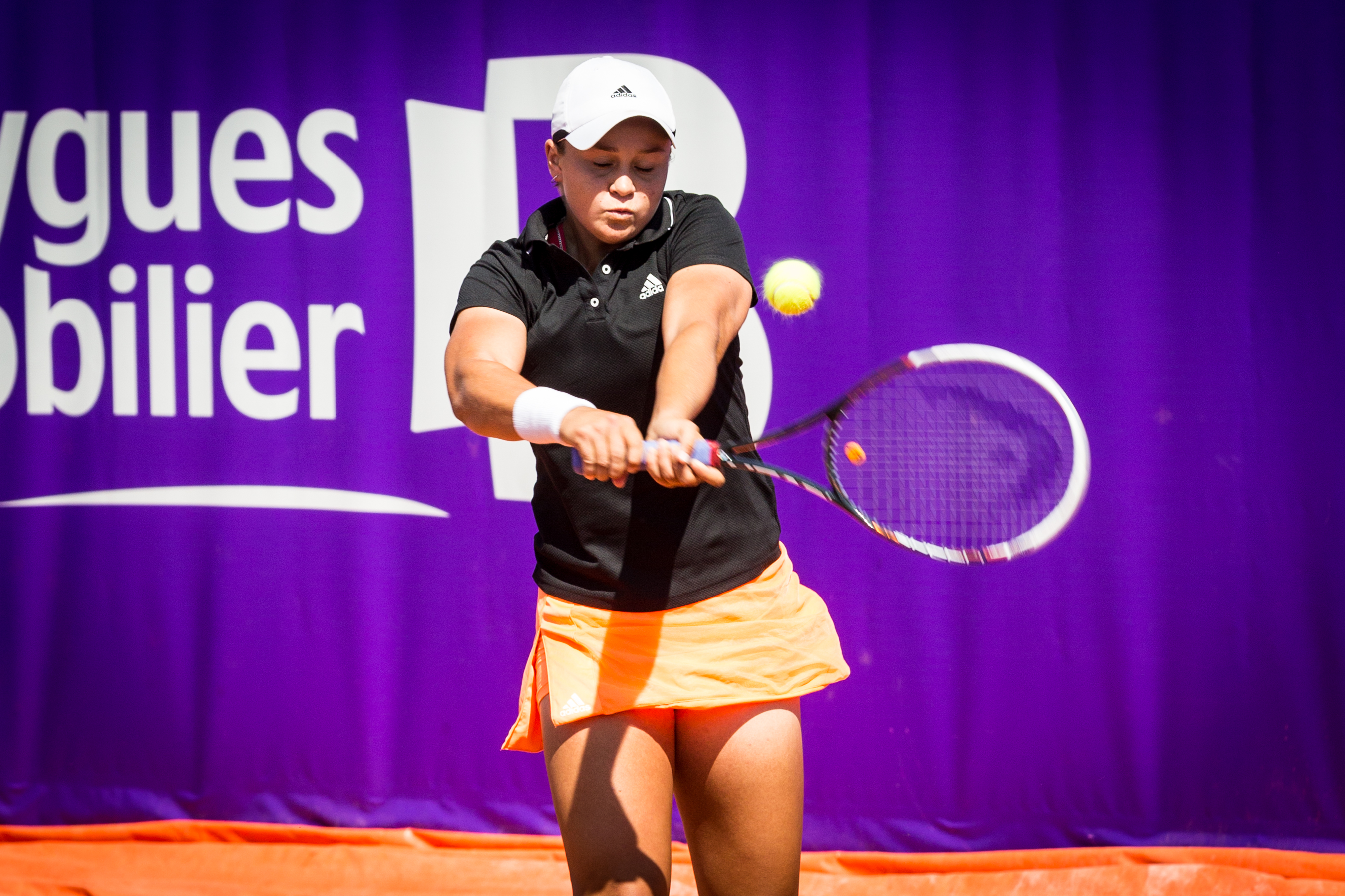 Ashleigh Barty, née le 24 avril 1996 à Ipswich, Queensland, est une joueuse de tennis professionnelle australienne.